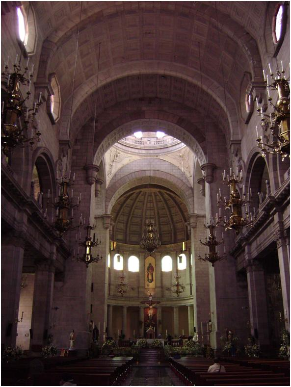 nabe principal de la Catedral de Toluca